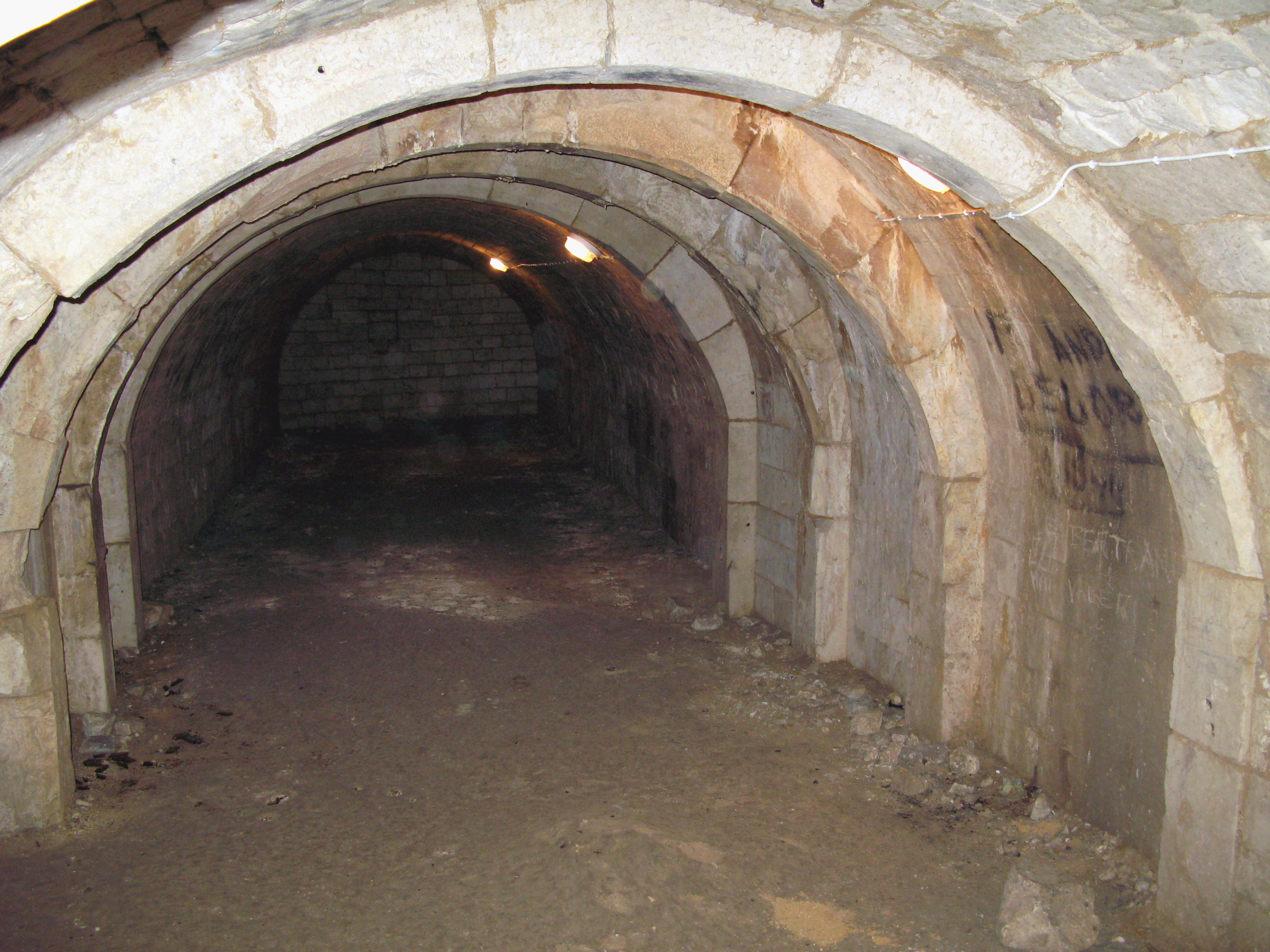 Picquigny (Somme, France) - Sous l'église, dont l'intérieur donne accès à l'entrée du souterrain, se trouve une salle voûtée.